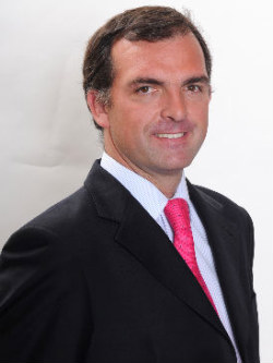 Ernesto Silva Mendez, abogado chileno